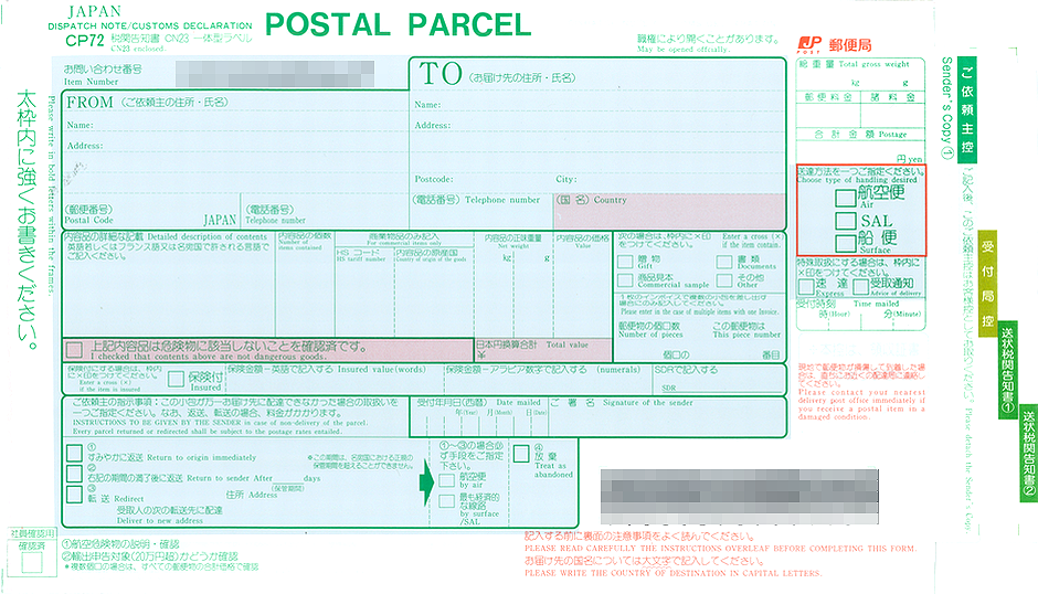 郵便 国際小包用ラベル